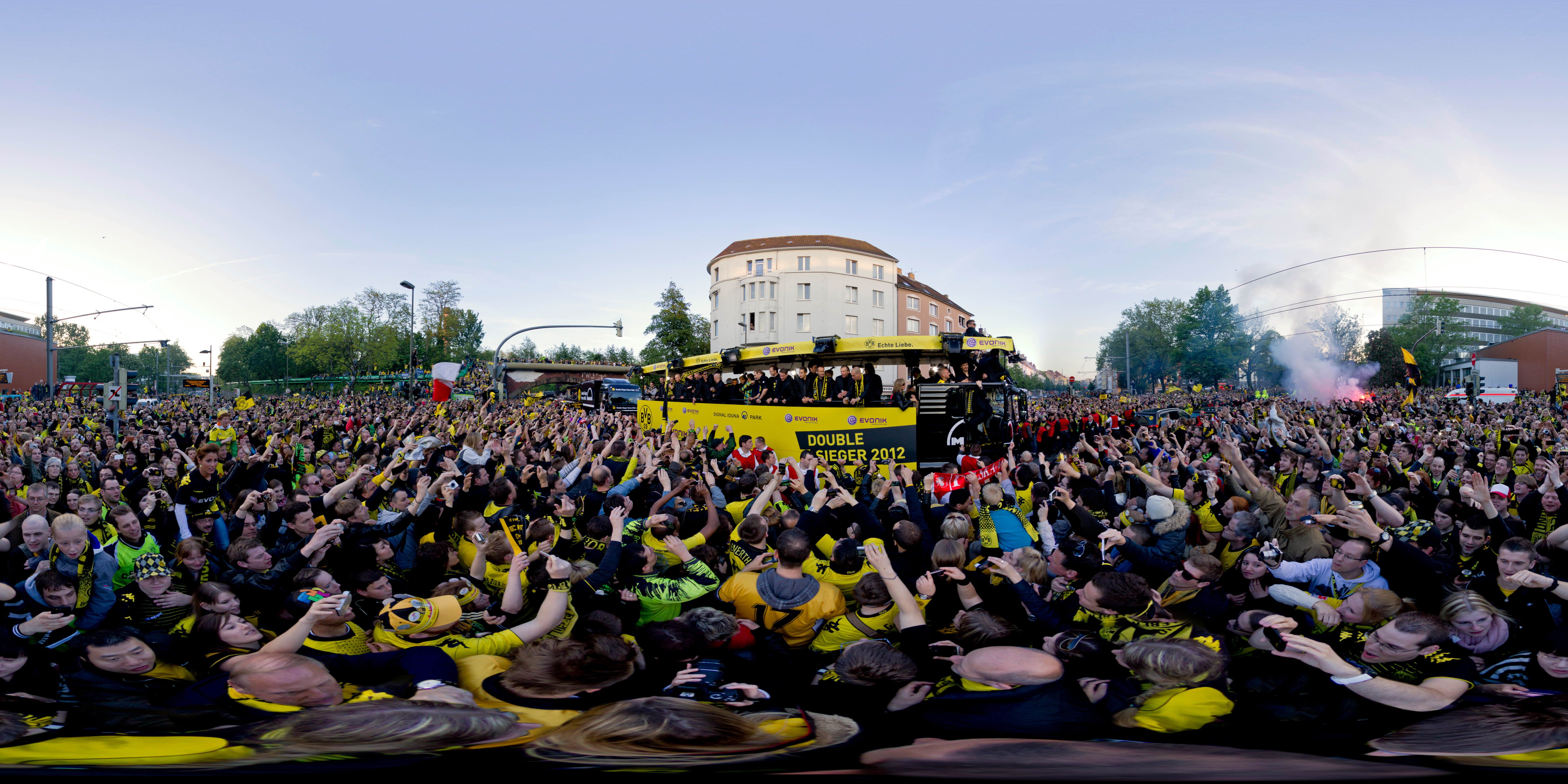 360° Panorama BVB Fans bejubeln die Mannschaft zur gewonnenen Meisterschaft 2012 in Dortmund.